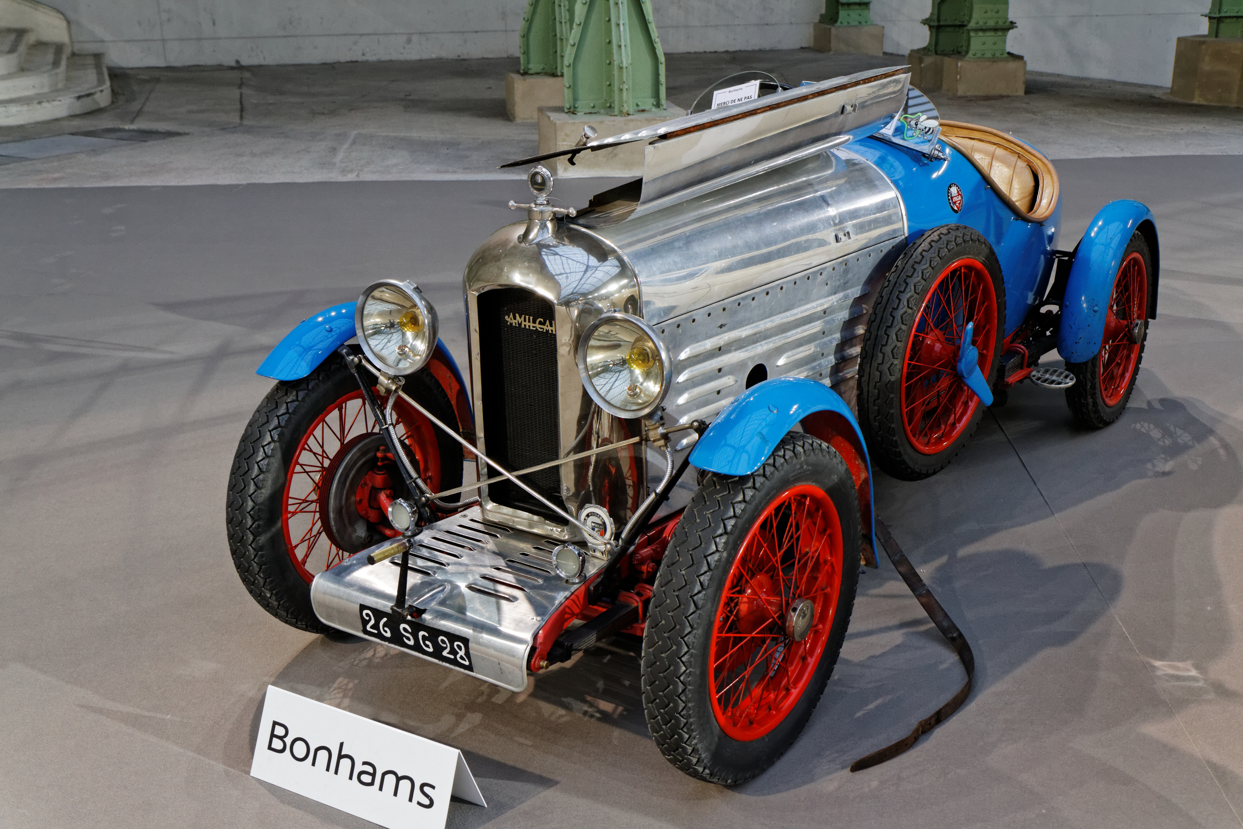 Une Amilcar CGS sports au Grand Palais lors de la vente Bonhams en février 2014.